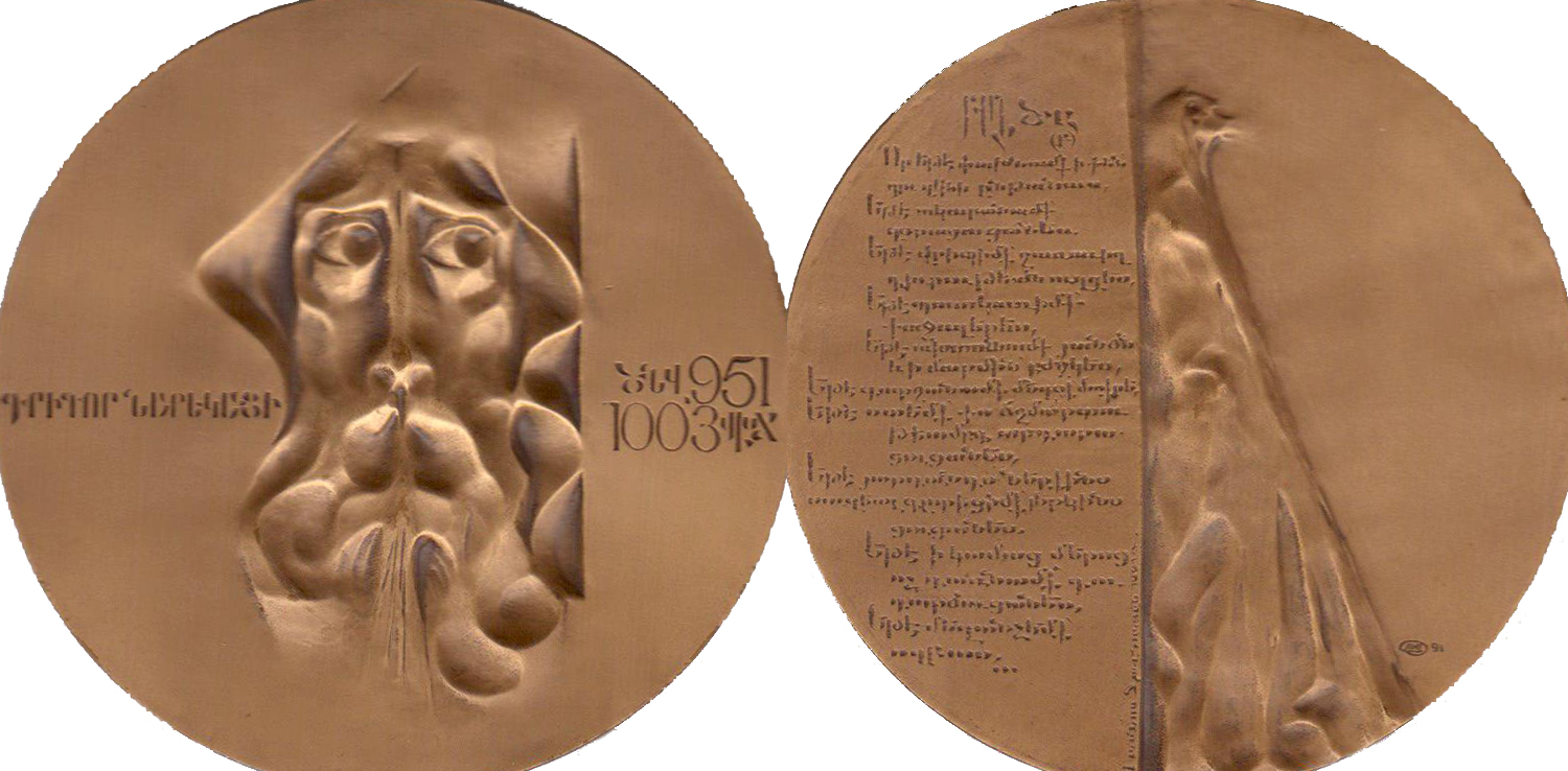 Տրված պրոֆեսոր Ծ. Հովհաննիսյանին ՀՀ Մշակույթի նախարարության կողմից